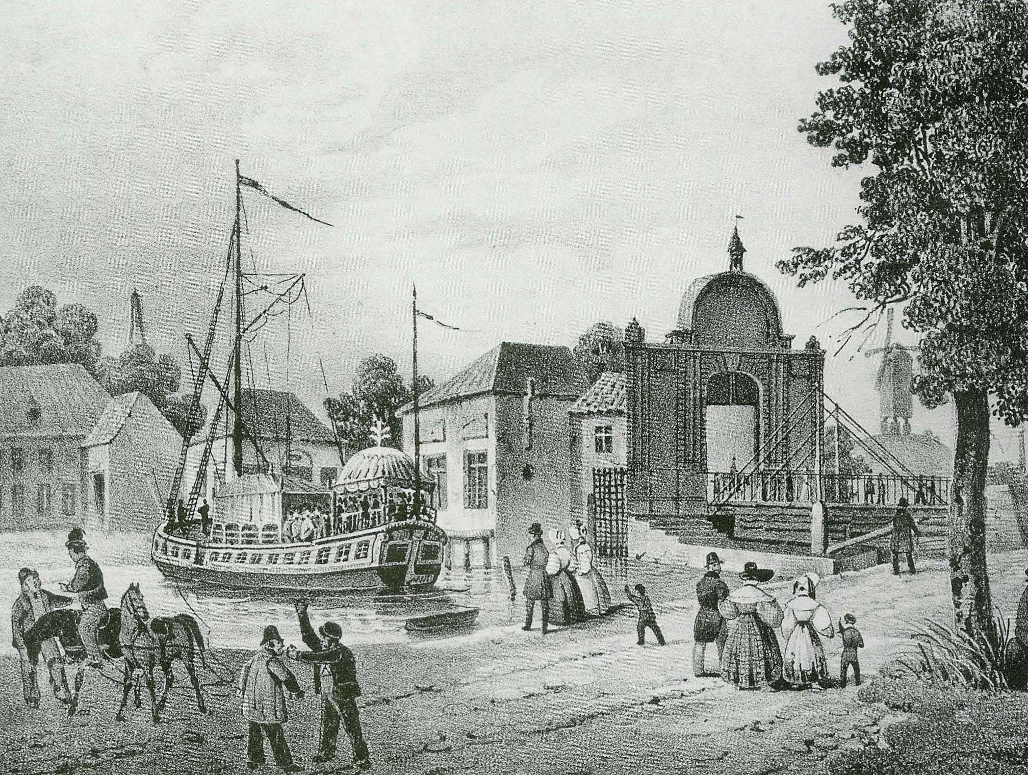 Schilderij van de Katelijnepoort - Brugge - West-Vlaanderen - Brugge